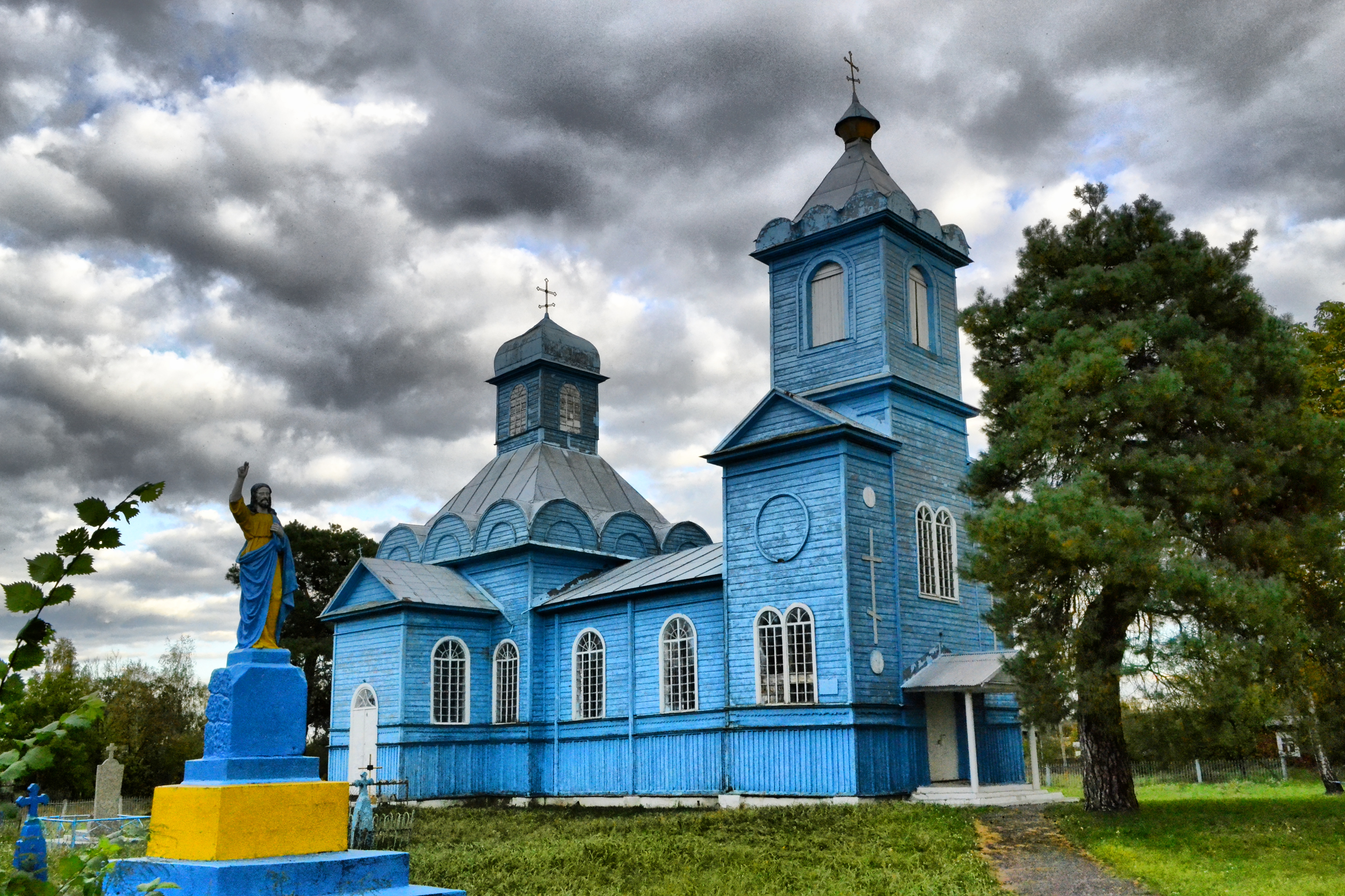 Беларуская (тарашкевіца): Царква Раства Багародзіцы. в. Лемяшэвічы This is a photo of Belarusian heritage monument. Reference number: 112Г000570 ( WLM)